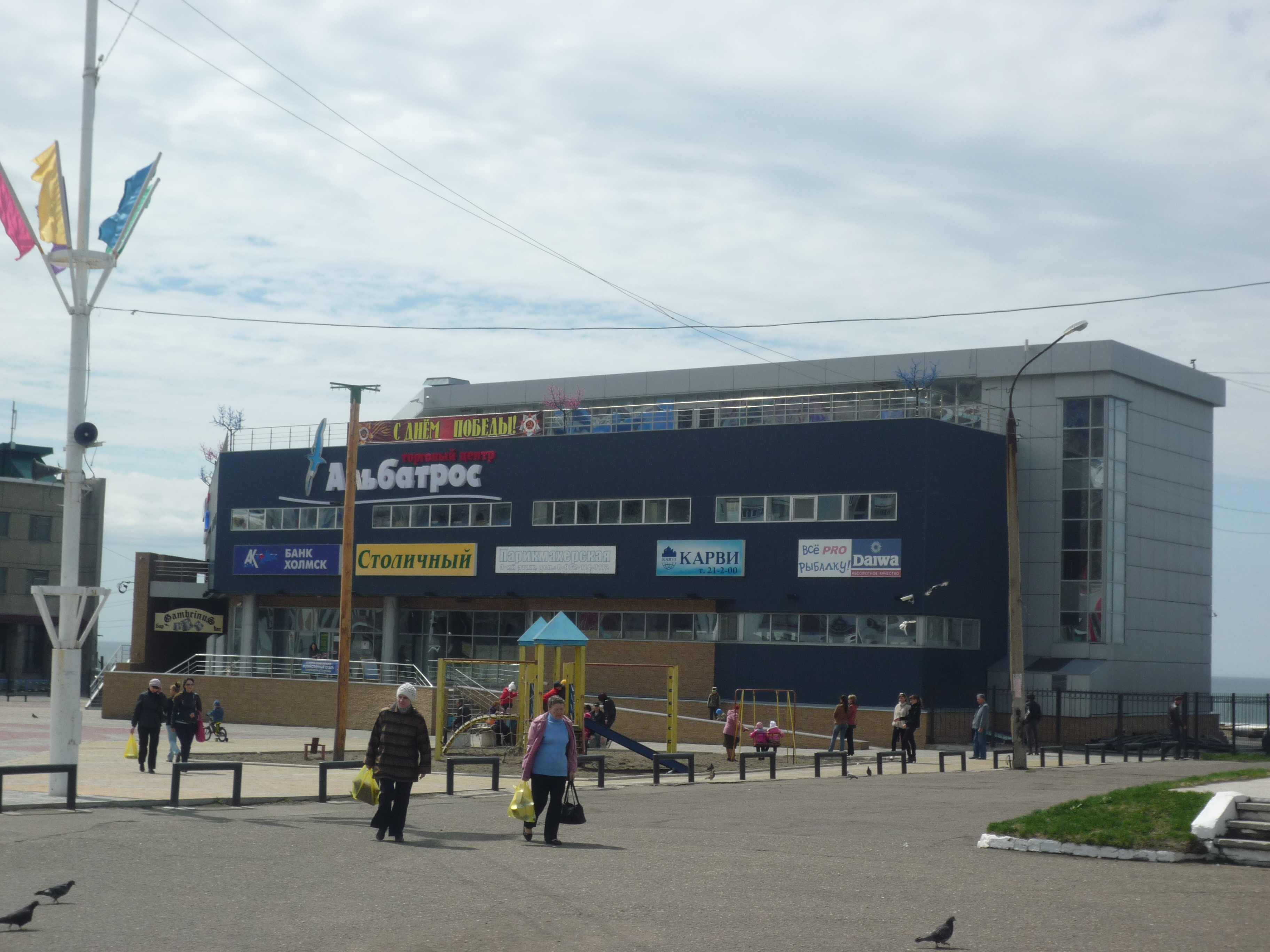 ТЦ Альбатрос (Холмск)